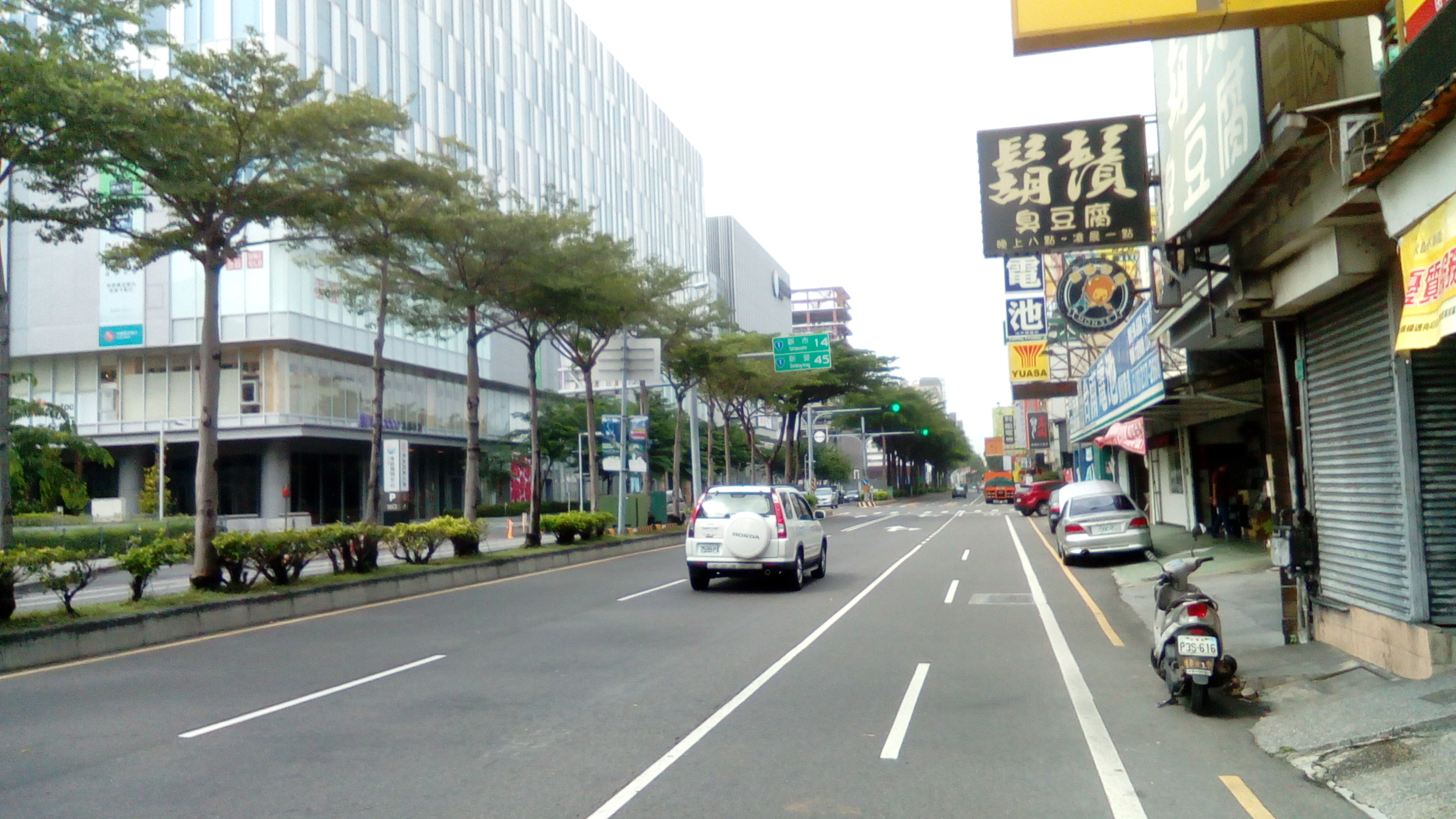 台一線 台南市東區路段